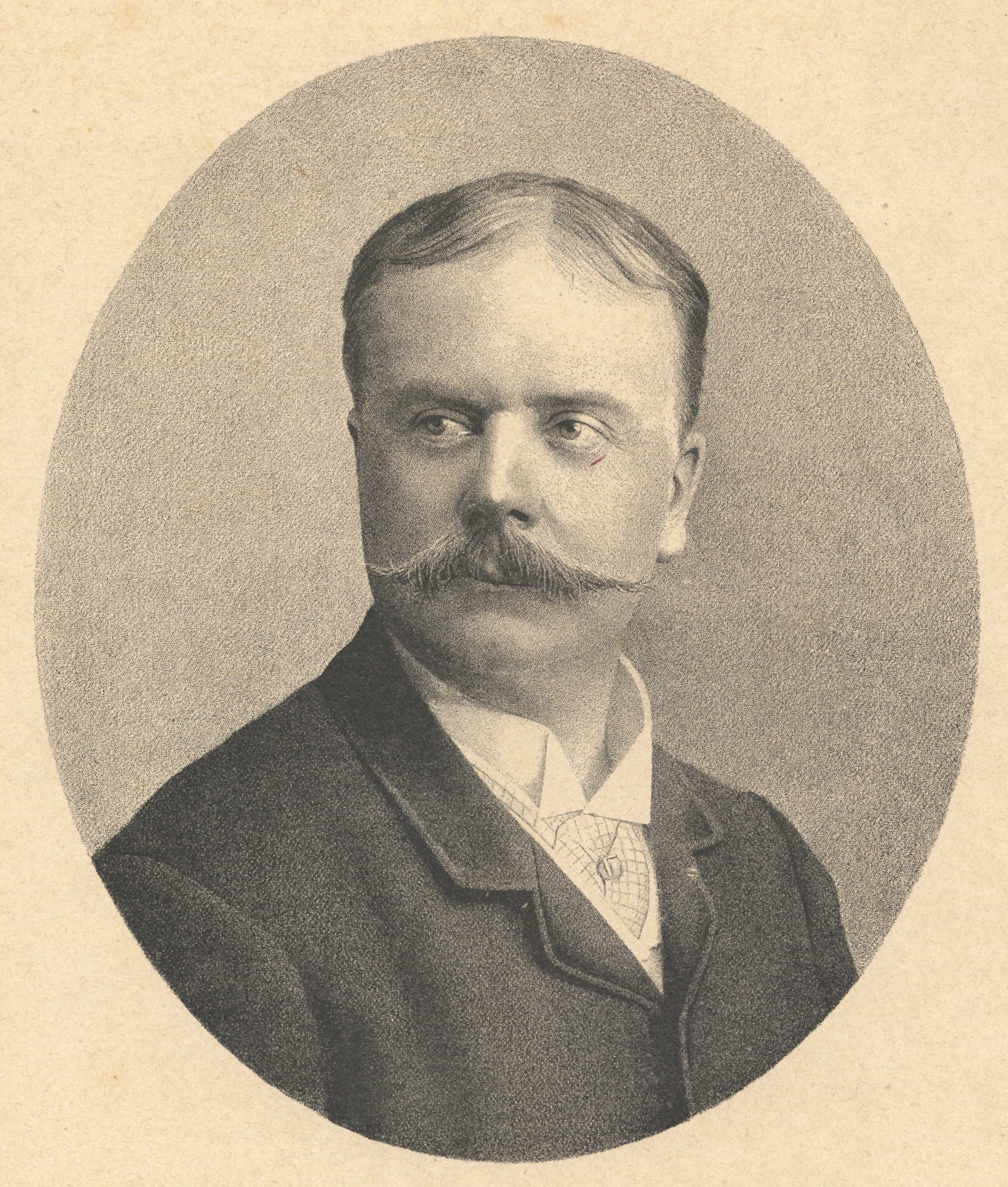 Henri Kowalski (1841-1916), pianiste virtuose et compositeur.